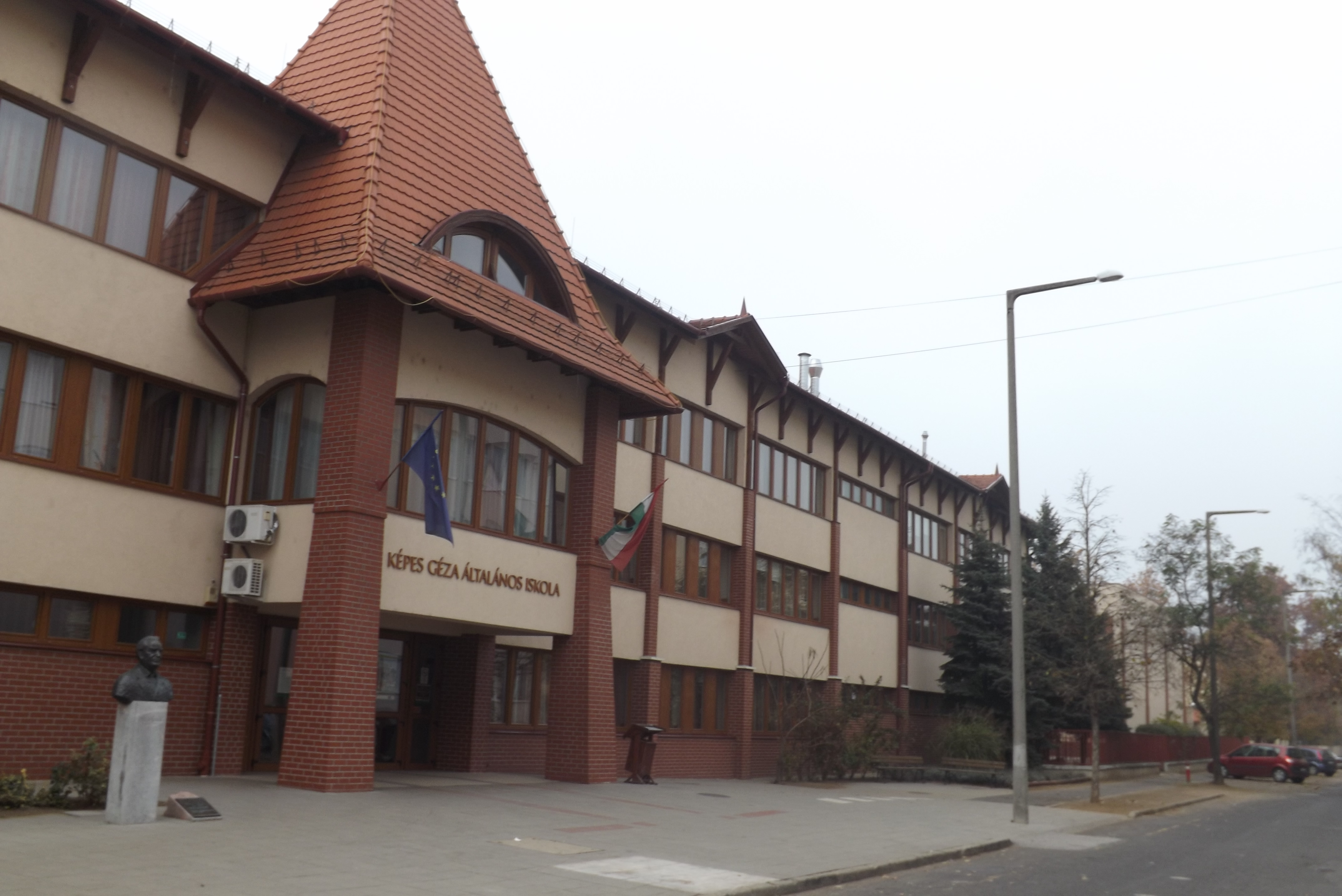 Keleti Lakótelep, Képes Géza Általános Iskola, az épület előtt Képes Géza mellszobra, Mátészalka